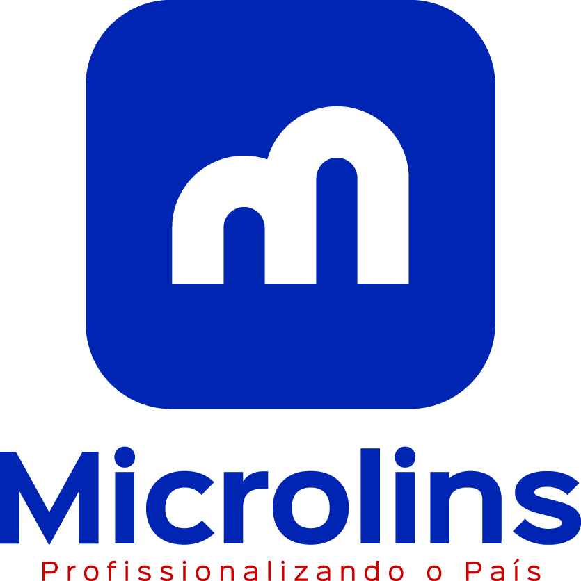 Logomarca atualizada no ano de 2016.